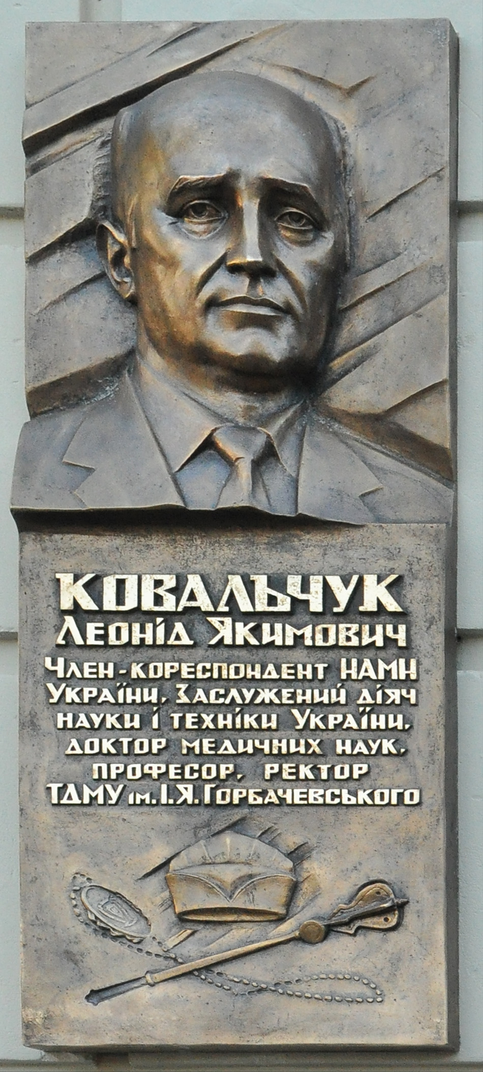 Пам'ятна дошка українському вченому-хірургу, ректору Тернопільського державного медичного університету Леонідові Якимовичу Ковальчуку на фасаді головного корпусу університету (Майдан Волі, 1). Автор пам'ятної дошки — Дмитро Пилип'як (м. Тернопіль).